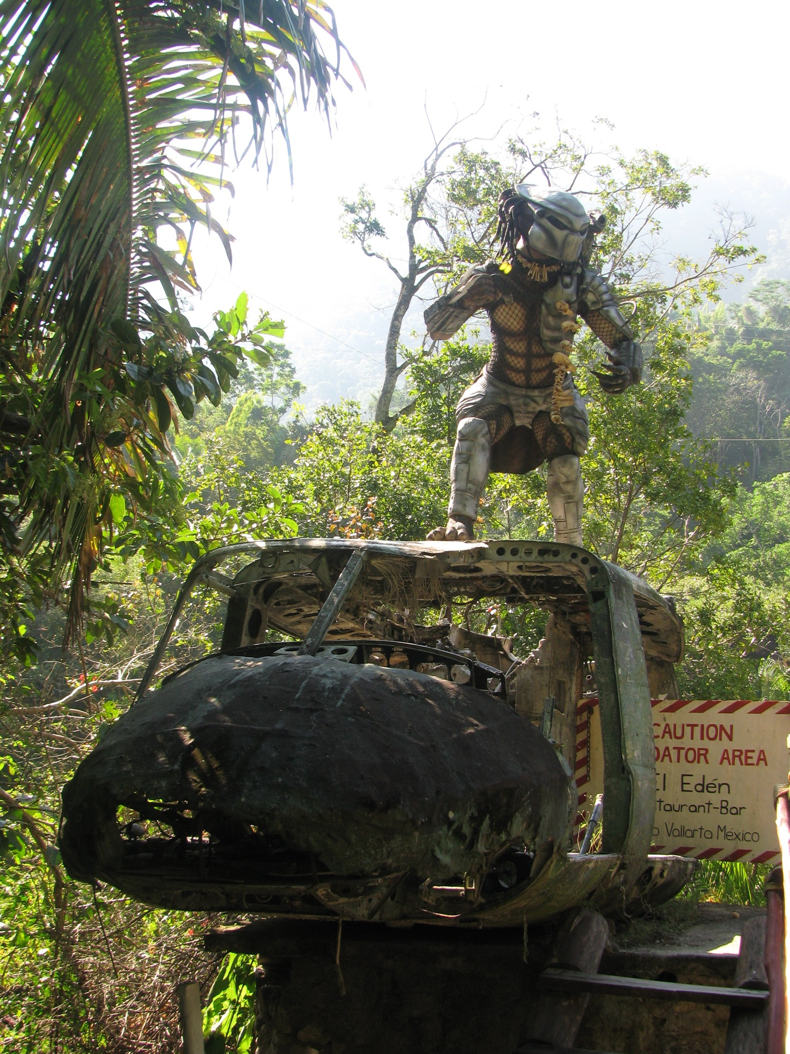 Predator filming site (Puerto Vallarta, Mexico).